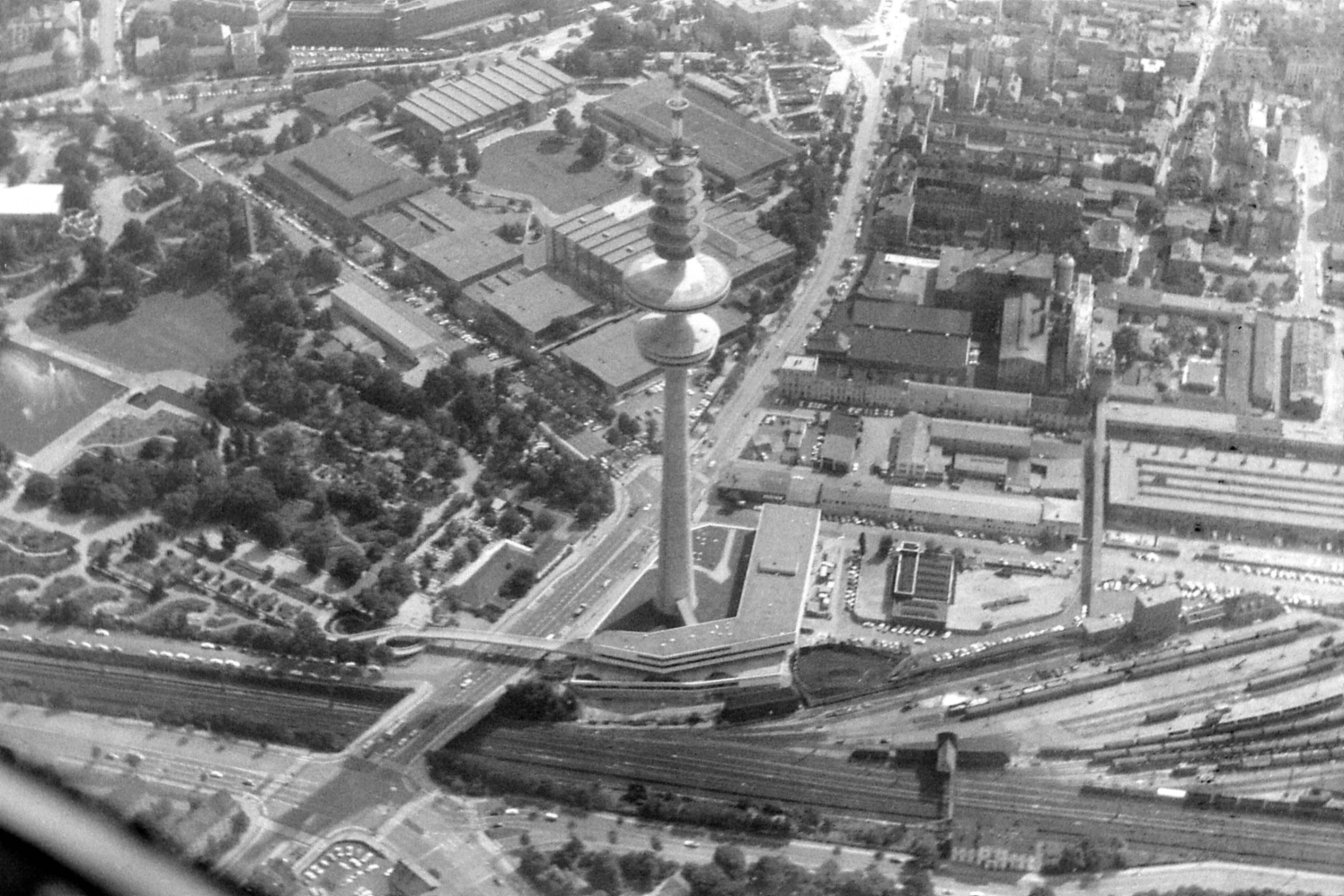 Funkturm Hamburg Ende der 60er